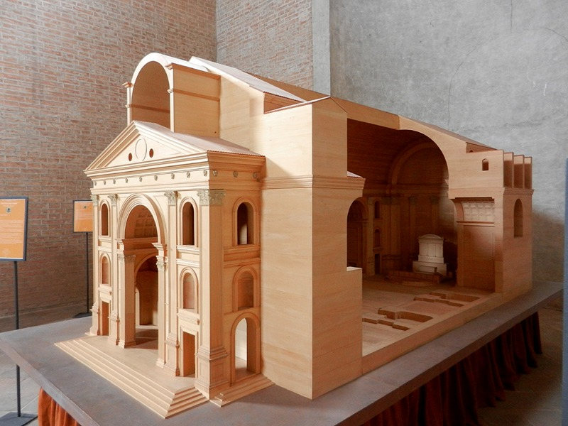 Modello in legno della Basilica di S. Andrea secondo il progetto di Leon Battista Alberti conservato nella Chiesa di S. Sebastiano a Mantova